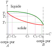 Suivi de la solidification avec un diagramme binaire. Auteur : Christophe Dang Ngoc Chan, réalisé avec un programme de dessin vectoriel. Licence GFDL Christophe Dang Ngoc Chan